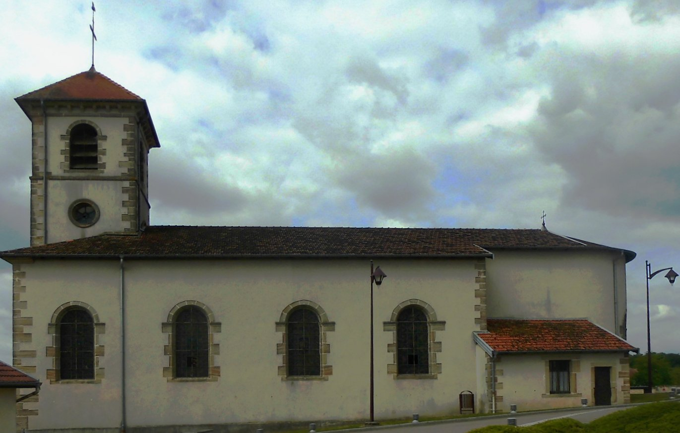 L'église Saint-Ferréol et Saint-Ferjeux d'Haréville